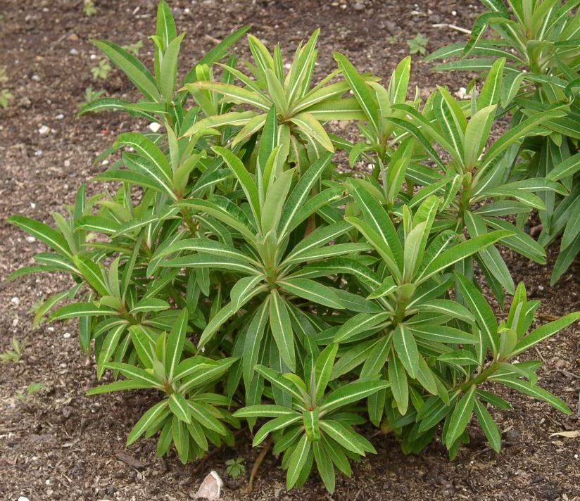 Euphorbia longifolia (o euphorbia mellifera (syn.)